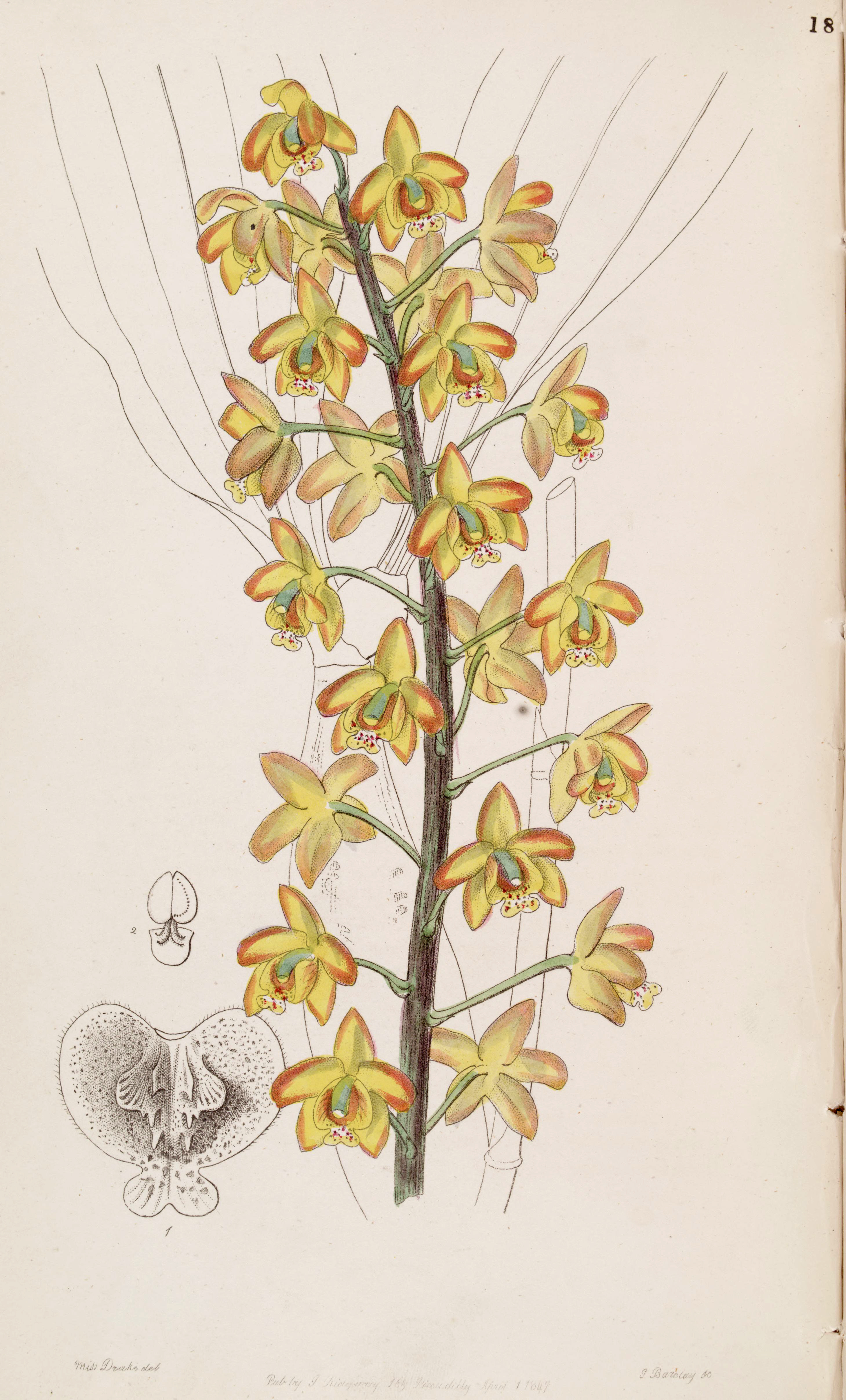 Eriopsis biloba